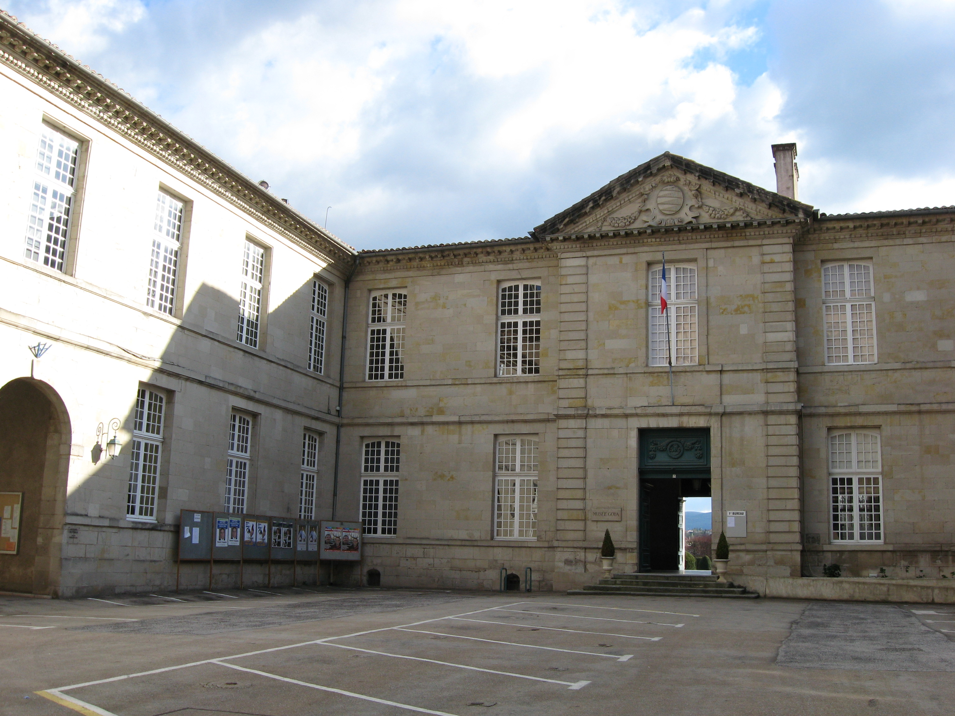 Musée Goya in Castres